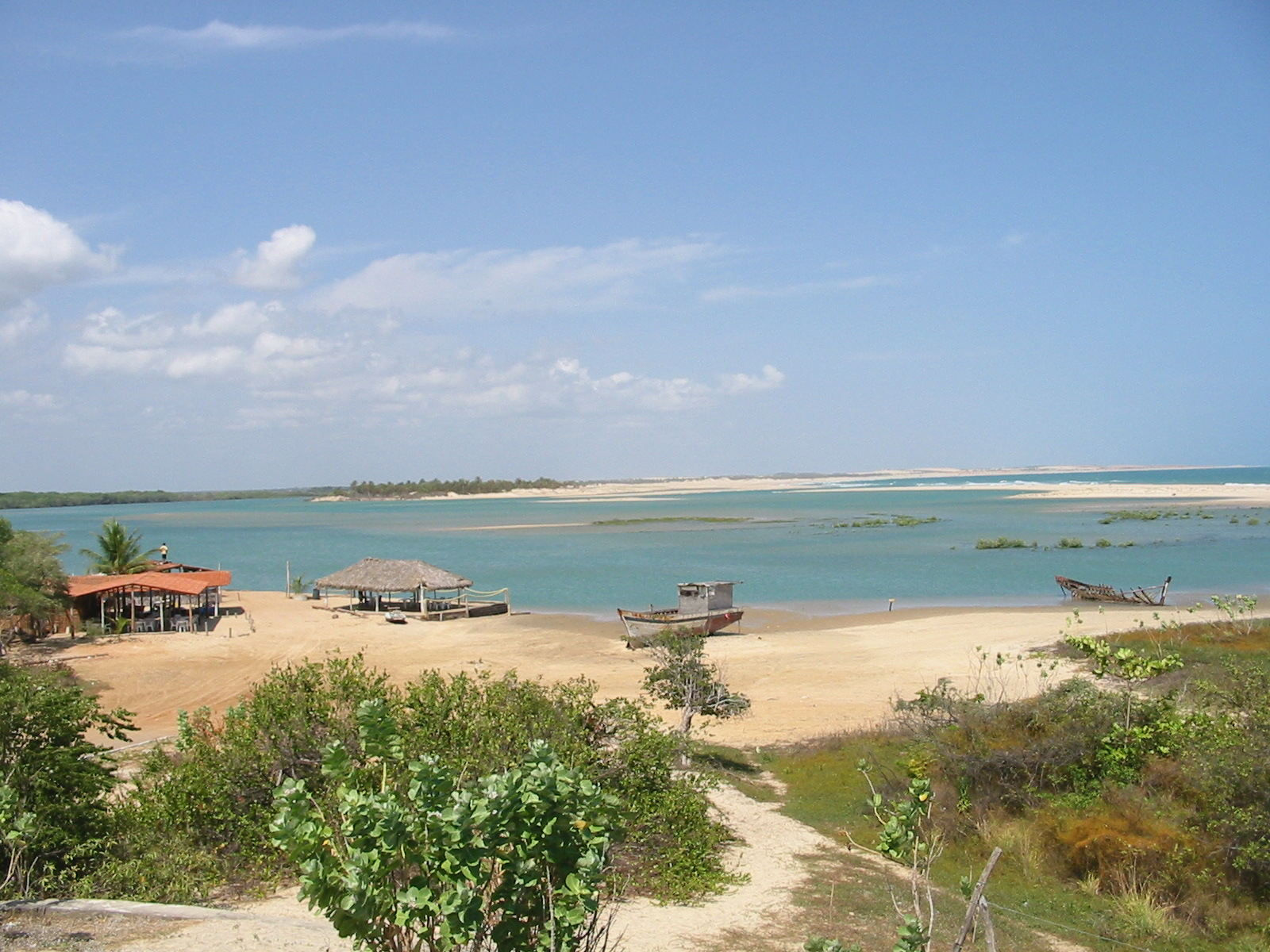 paracuru brasile ceara